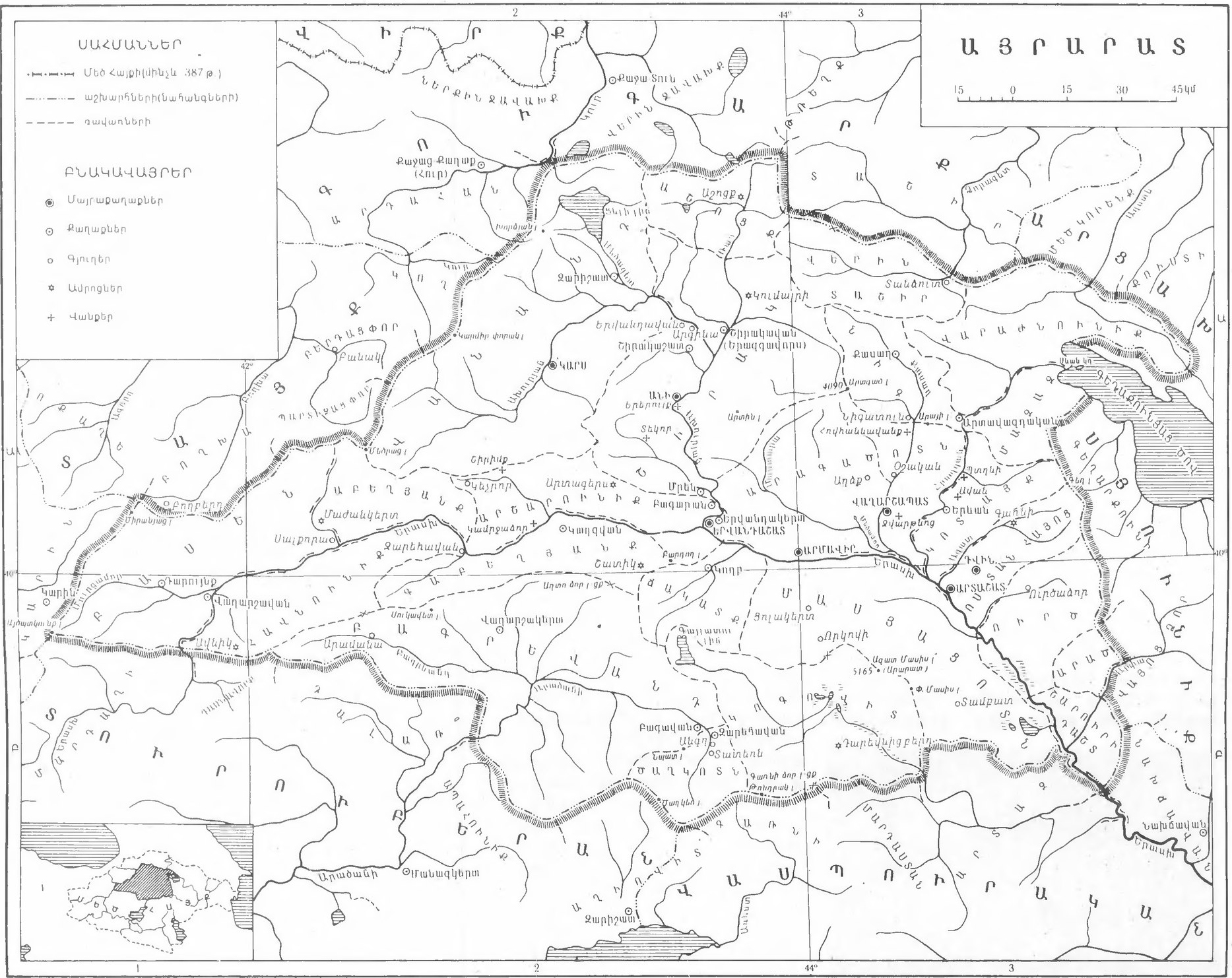 Այրարատ նահանգ